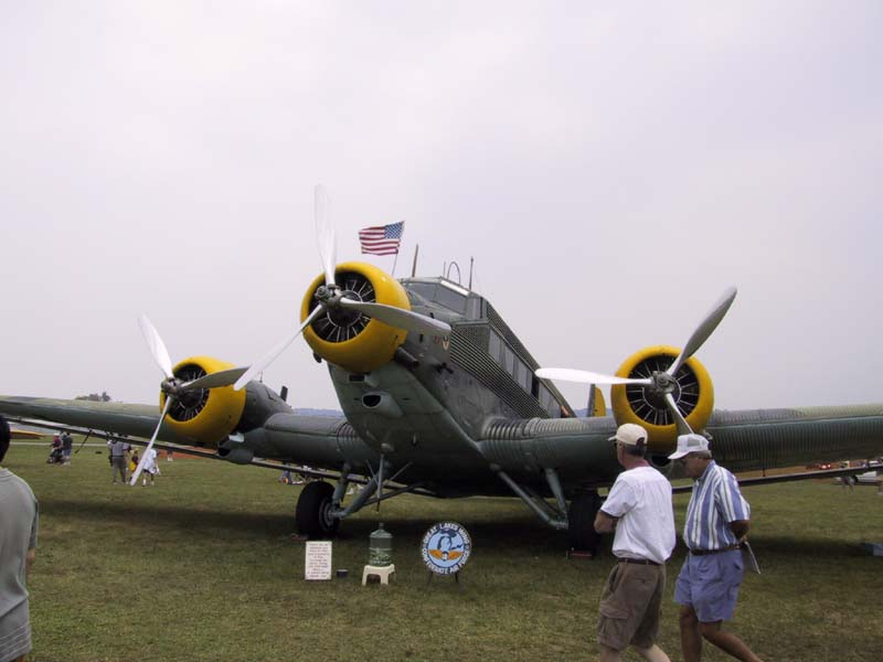 Ju 52